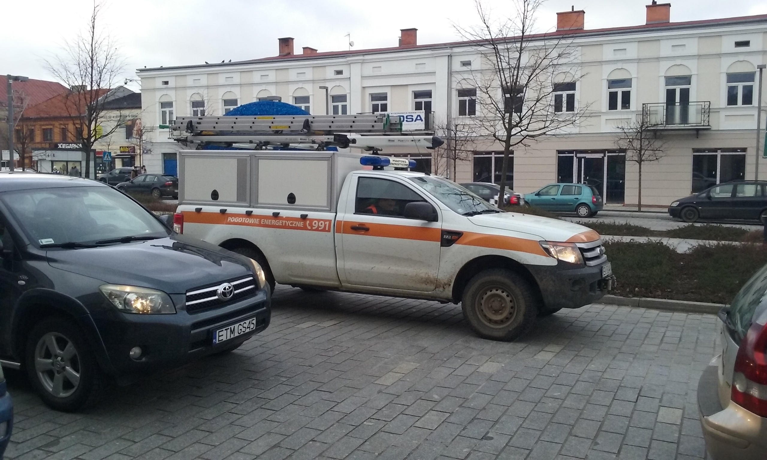 Wóz pogotowia energetycznego w 60-tysięcznym Tomaszowie Mazowieckim, w województwie łódzkim